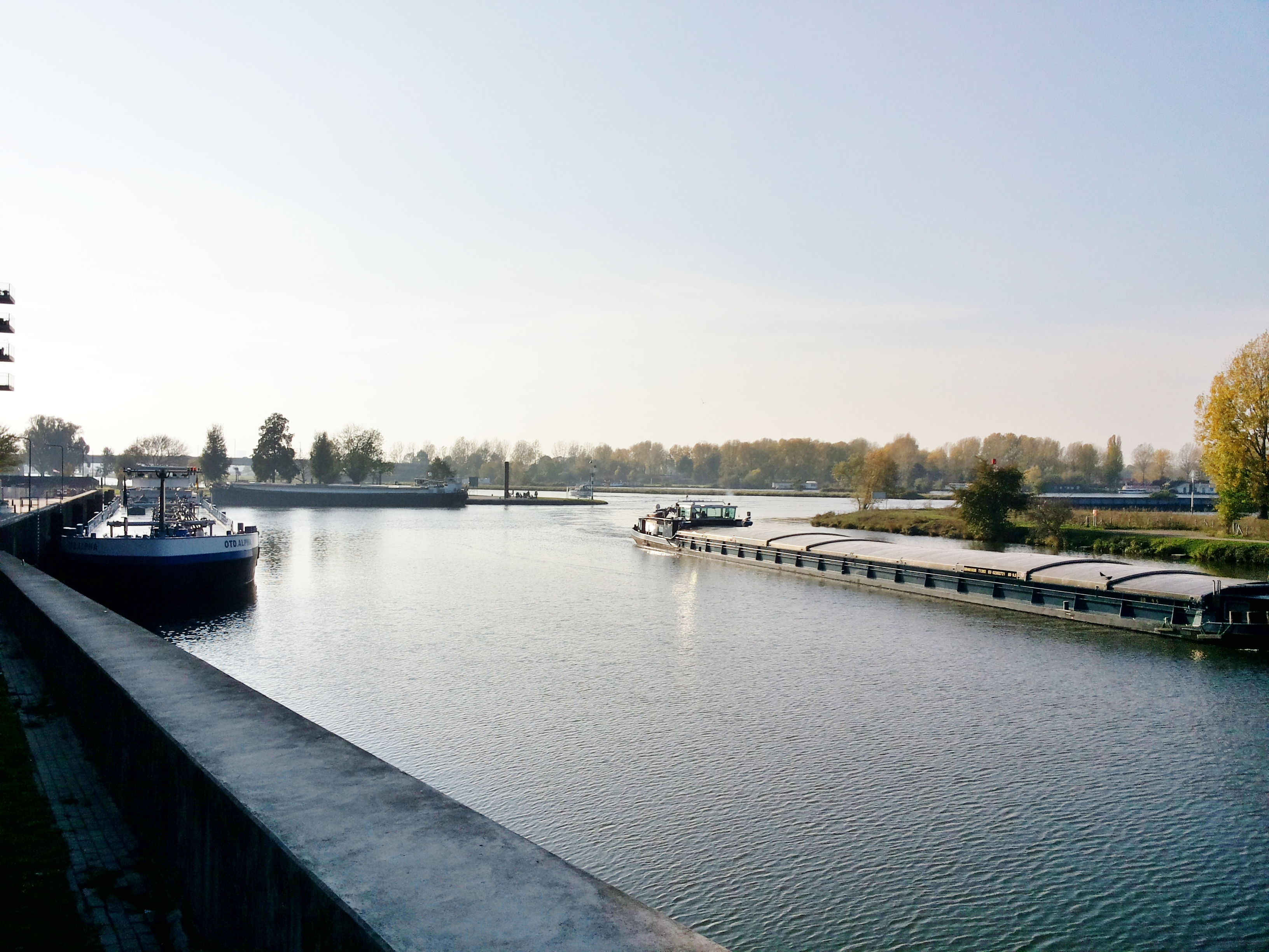 Der Industriehafen Roermond, Maasanbindung